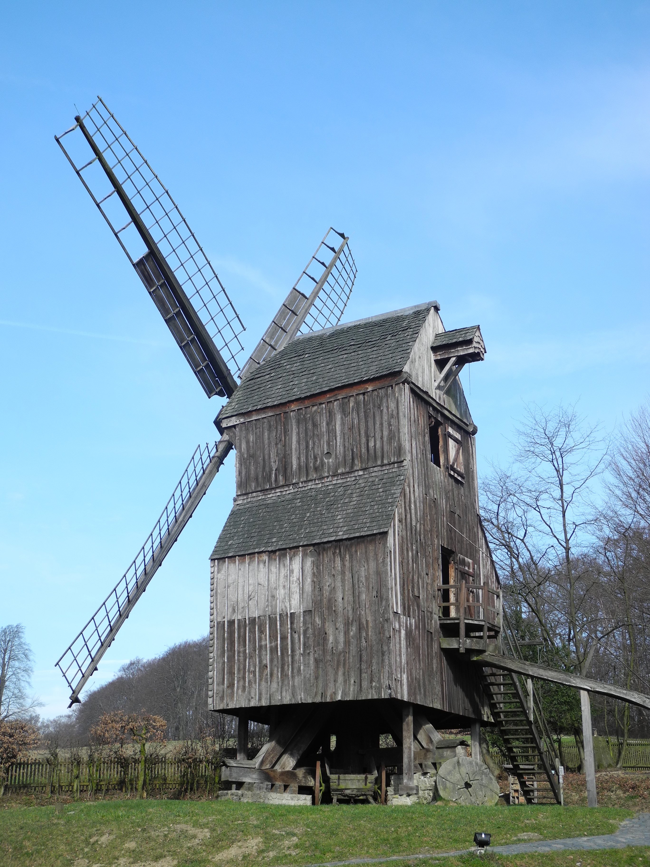 Bockwindmühle 1